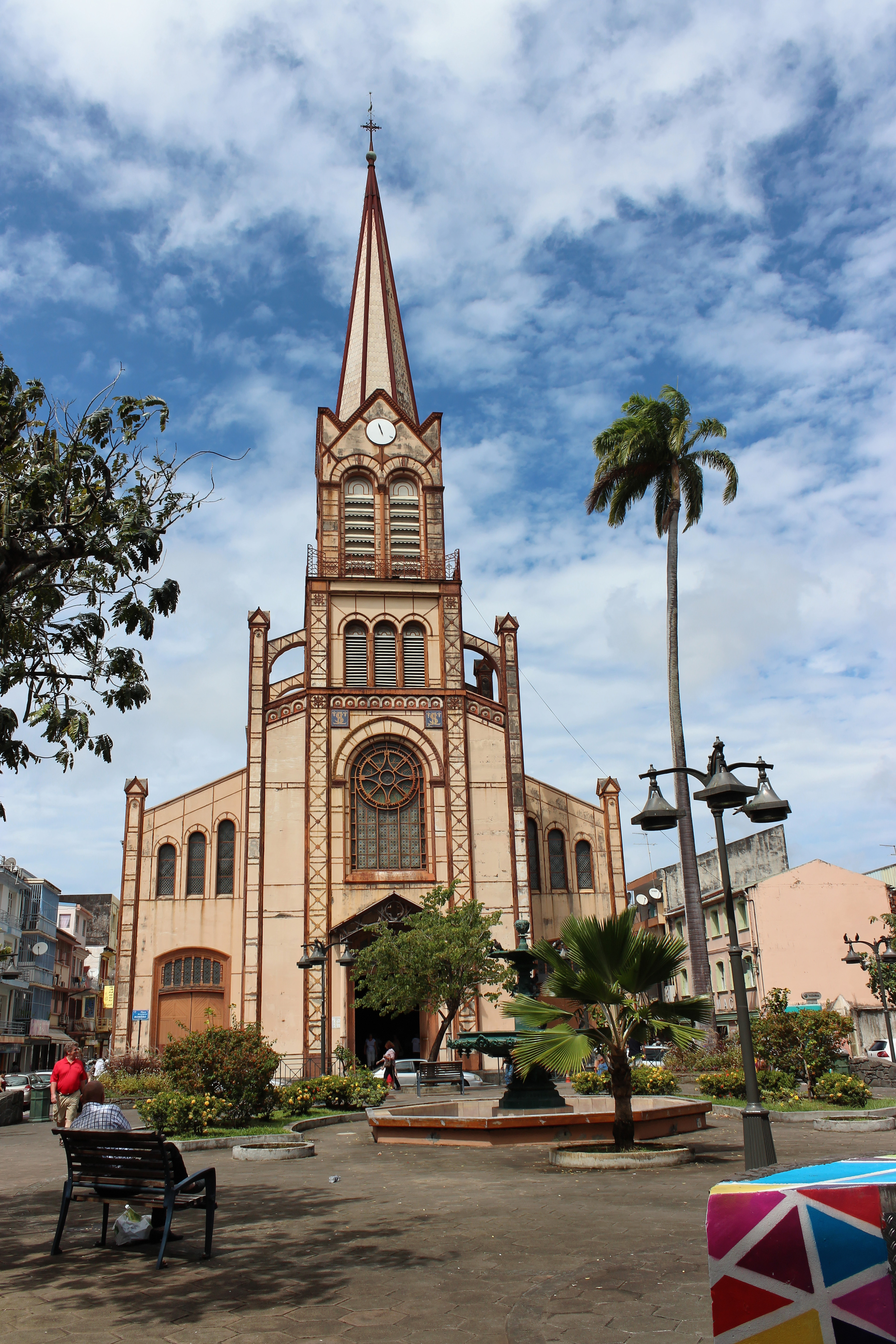 Cathédrale Saint-Louis .